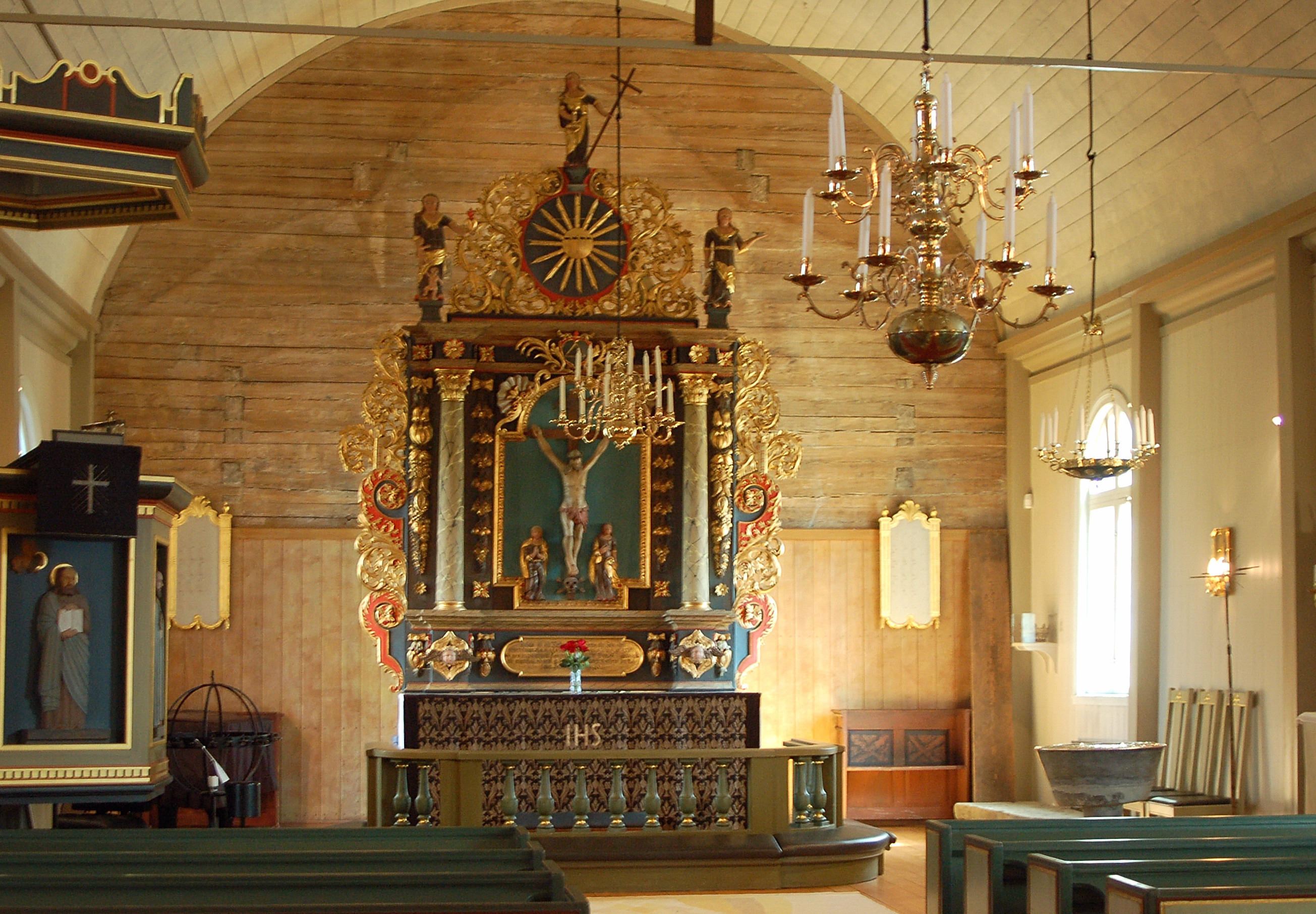 Hammarö kyrka österut med altaret och altartavlan.